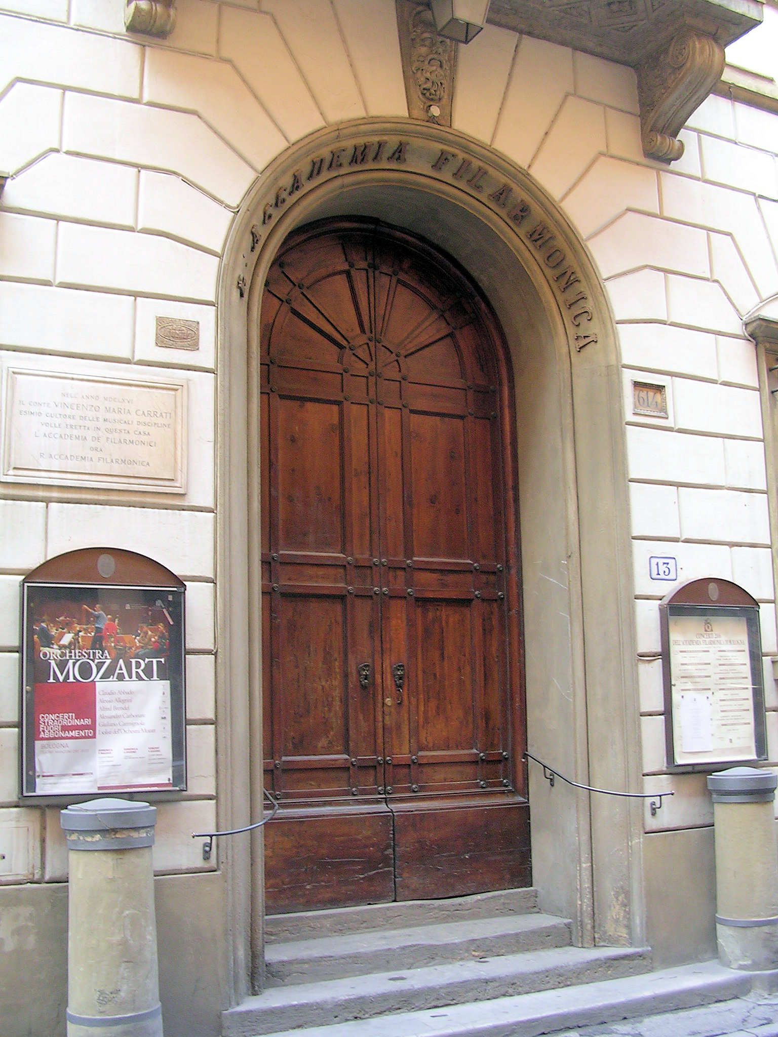 Accademia Filarmonica di Bologna - Philharmonic Academy of Bologna